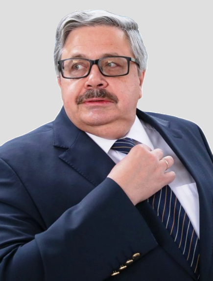 Алексей Владимирович Ерхов (род.1960) — российский дипломат